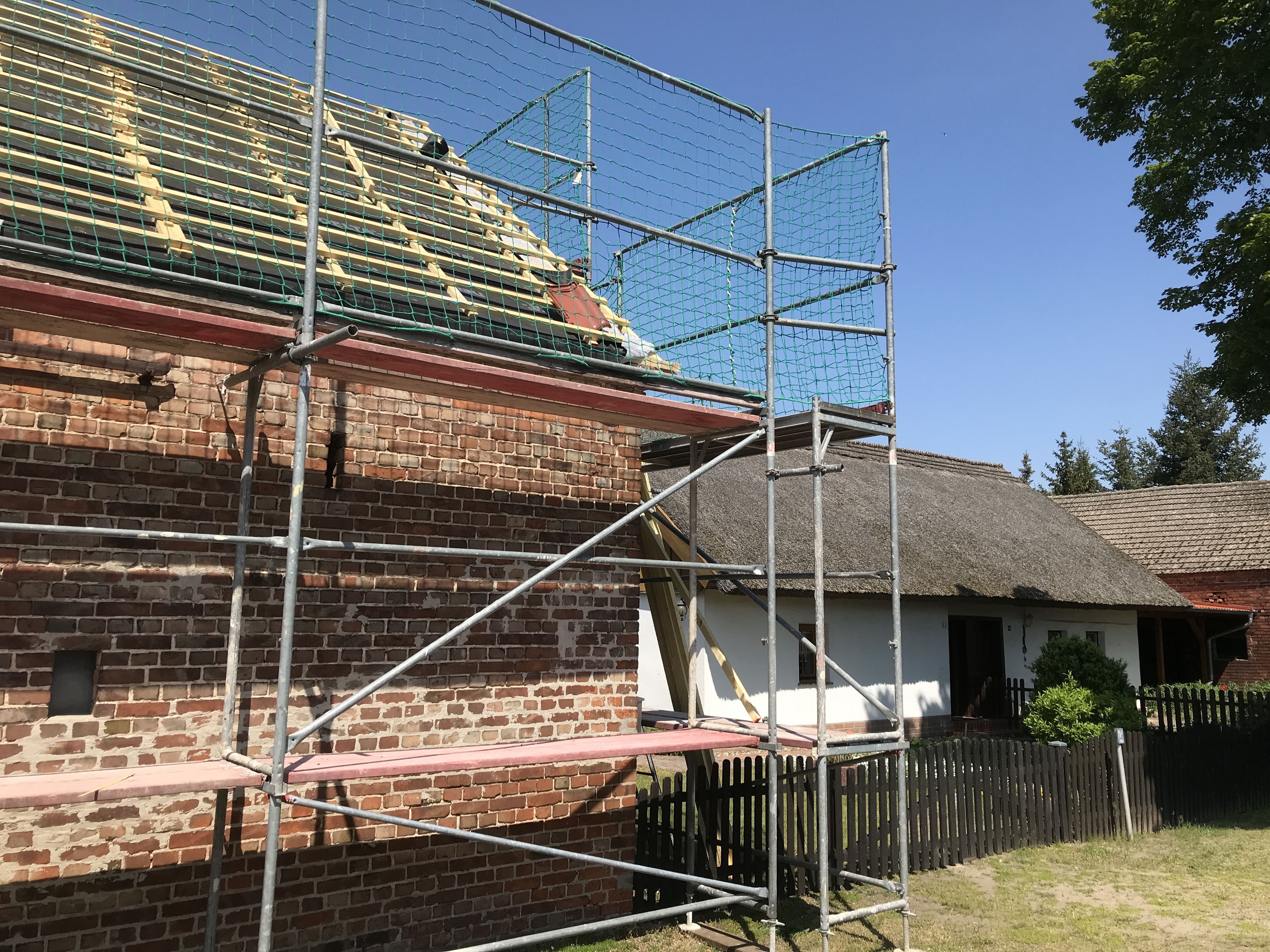 Raßmannsdorf, ein bewohnter Gemeindeteil von Rietz-Neuendorf in Brandenburg